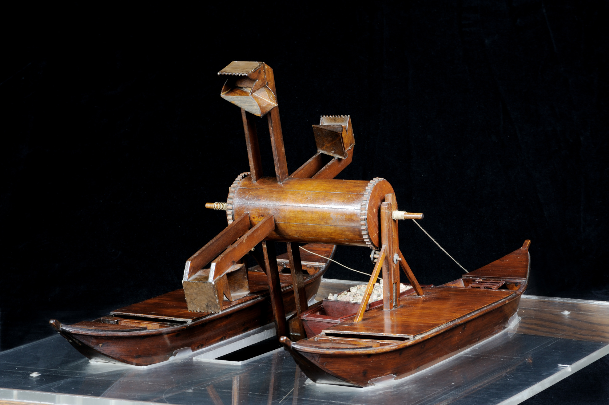 Draga cavafango di Leonardo da Vinci. Esposta presso il Museo nazionale della scienza e della tecnologia "L. Da Vinci" di Milano.